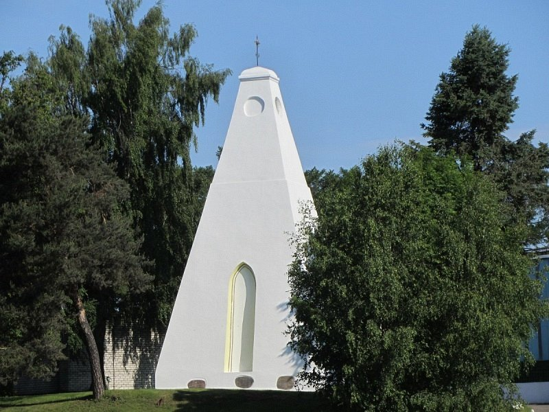 Маліноўшчына. Капліца-пахавальня Свентаржэцкіх